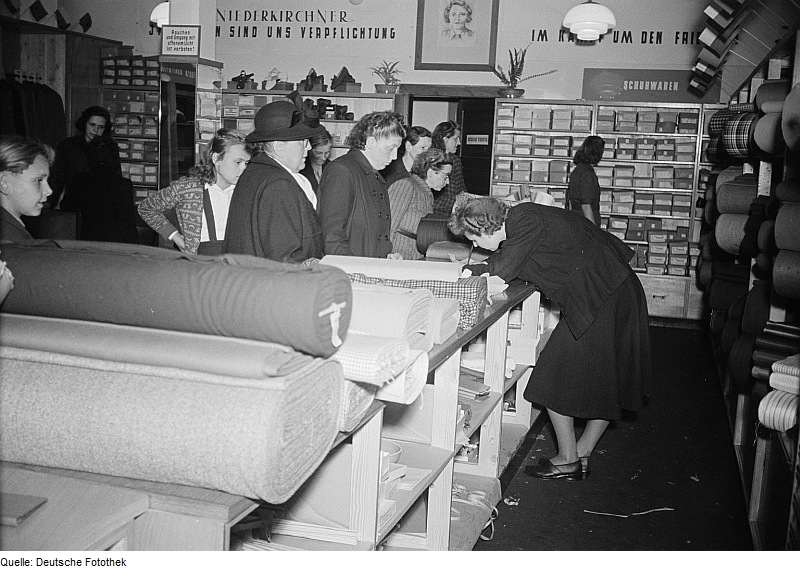 Original image description from the Deutsche Fotothek Verkäuferin berät Kunden in der Textilwarenabteilung eines Konsum-Kaufhauses